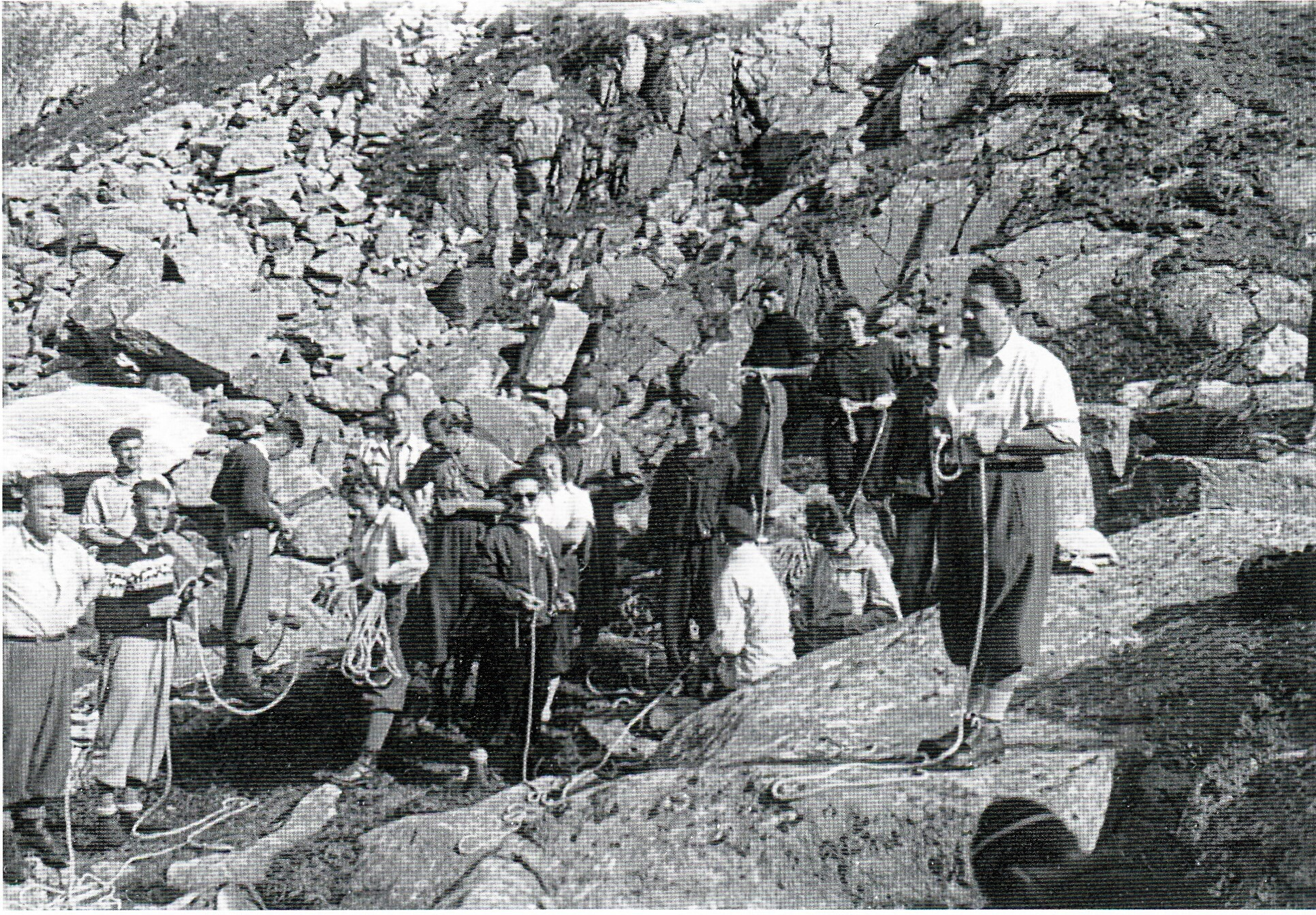 Horolezci horolezeckého spolku JAMES v lete 1945 sa učili viazať uzly na kurze JAMES vo Vysokých Tatrách. Slovakia